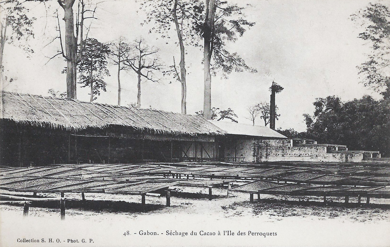 Gabon. Séchage du cacao à l'île des Perroquets. Collection S.H.O. - G.P. phot.